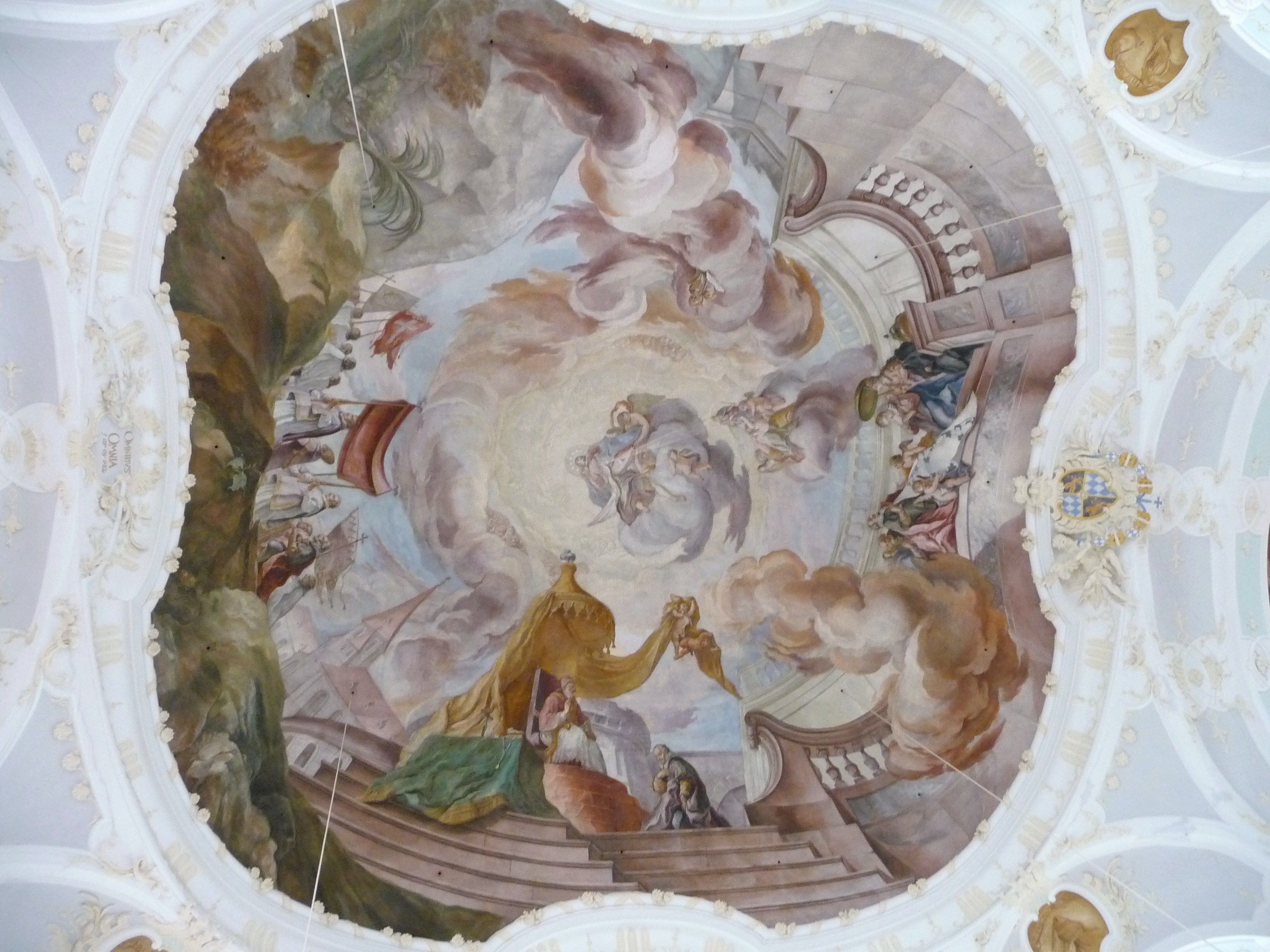 Großes Fresko in der Wallfahrtskirche Aufhausen; Motiv: Maria-Schnee-Legende Joseph Zitter Alternative namesFranz Joseph Zitter; Josef ZitterDescription German painter Date of birth/death1712circa 1760 or 1773Authority control VIAF: 45197356 ISNI: 0000 0000 1658 7759 GND: 122998901